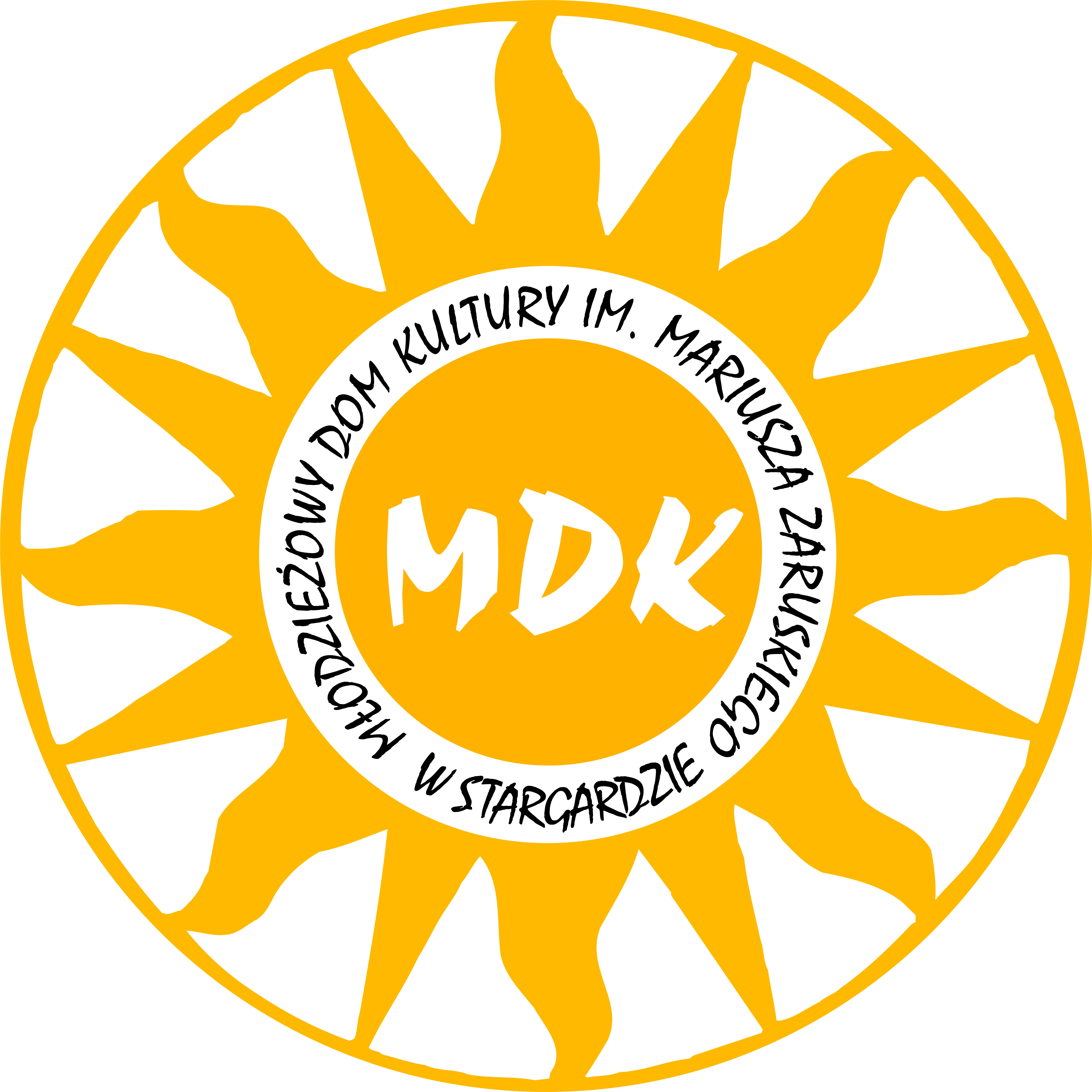 Stosowane logo MDK Stargard